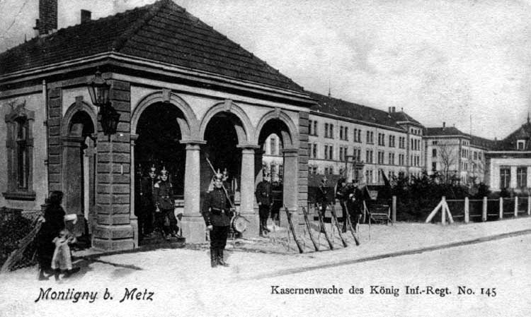 Kaserne des InfRgt Nr. 145 in Metz (Caserne Raffenel á Metz)